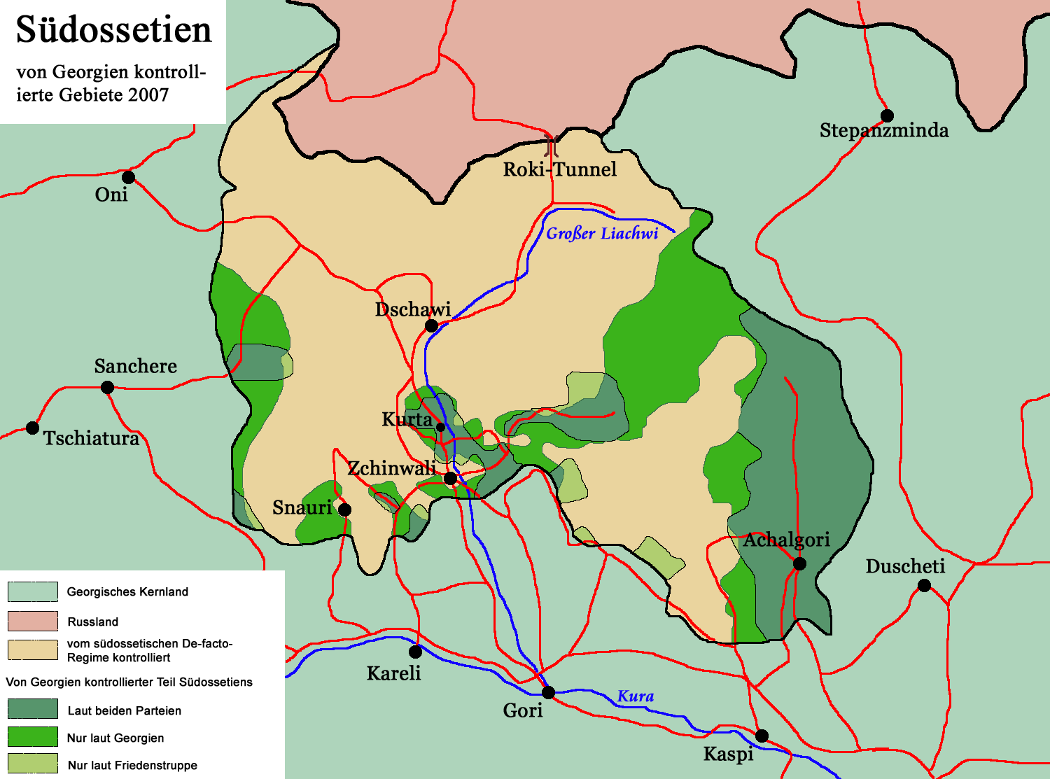 Karte Südossetiens 2007 mit georgisch kontrollierten Gebieten (Entwurf)